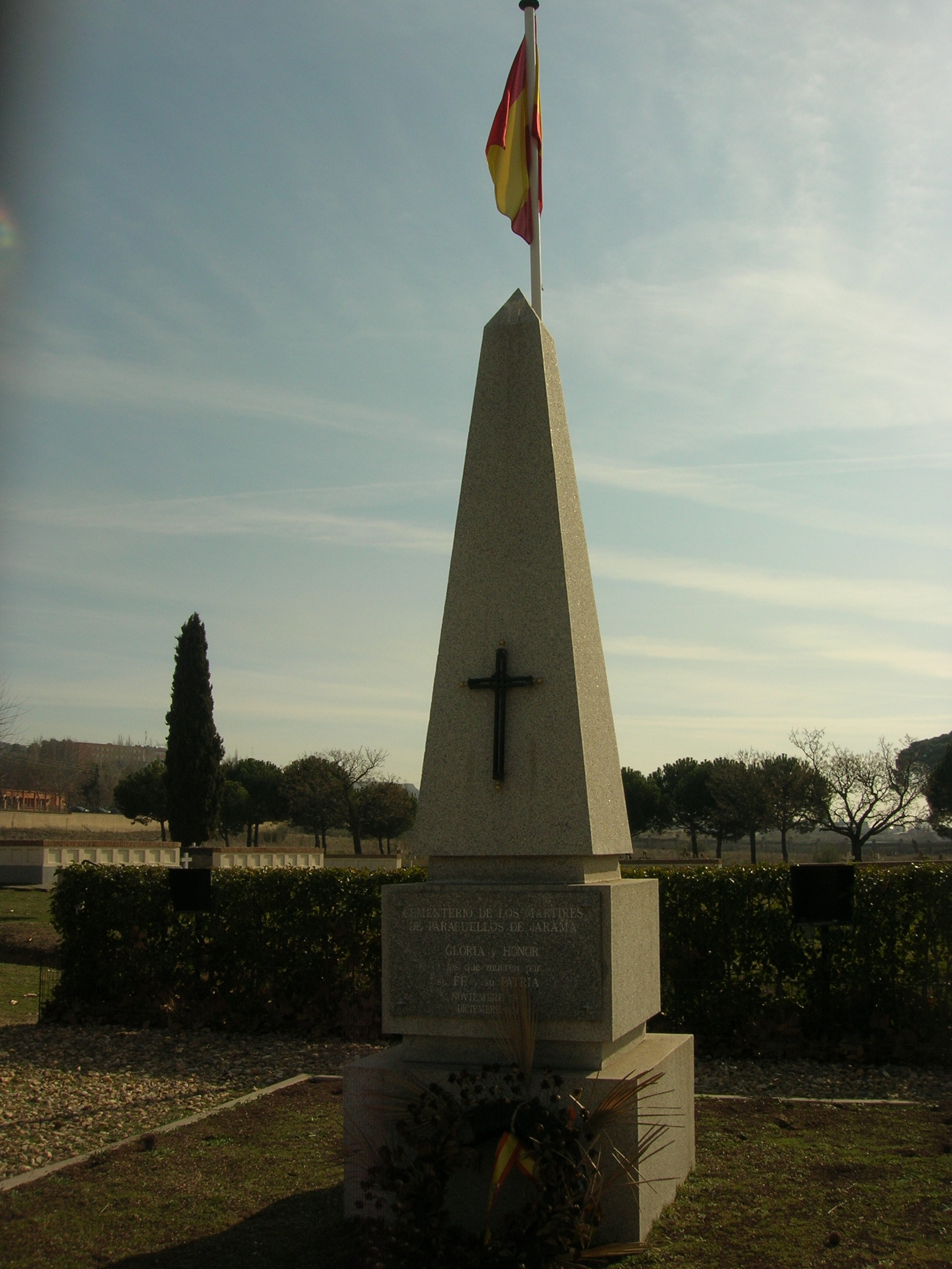 Monolito en el cementerio de las Matanzas de Paracuellos; La inscripción reza: "Cementerio de los Mártires de Paracuellos de Jarama GLORIA Y HONOR A los que mueren por su FE y su PATRIA Noviembre 1936 Diciembre 1936